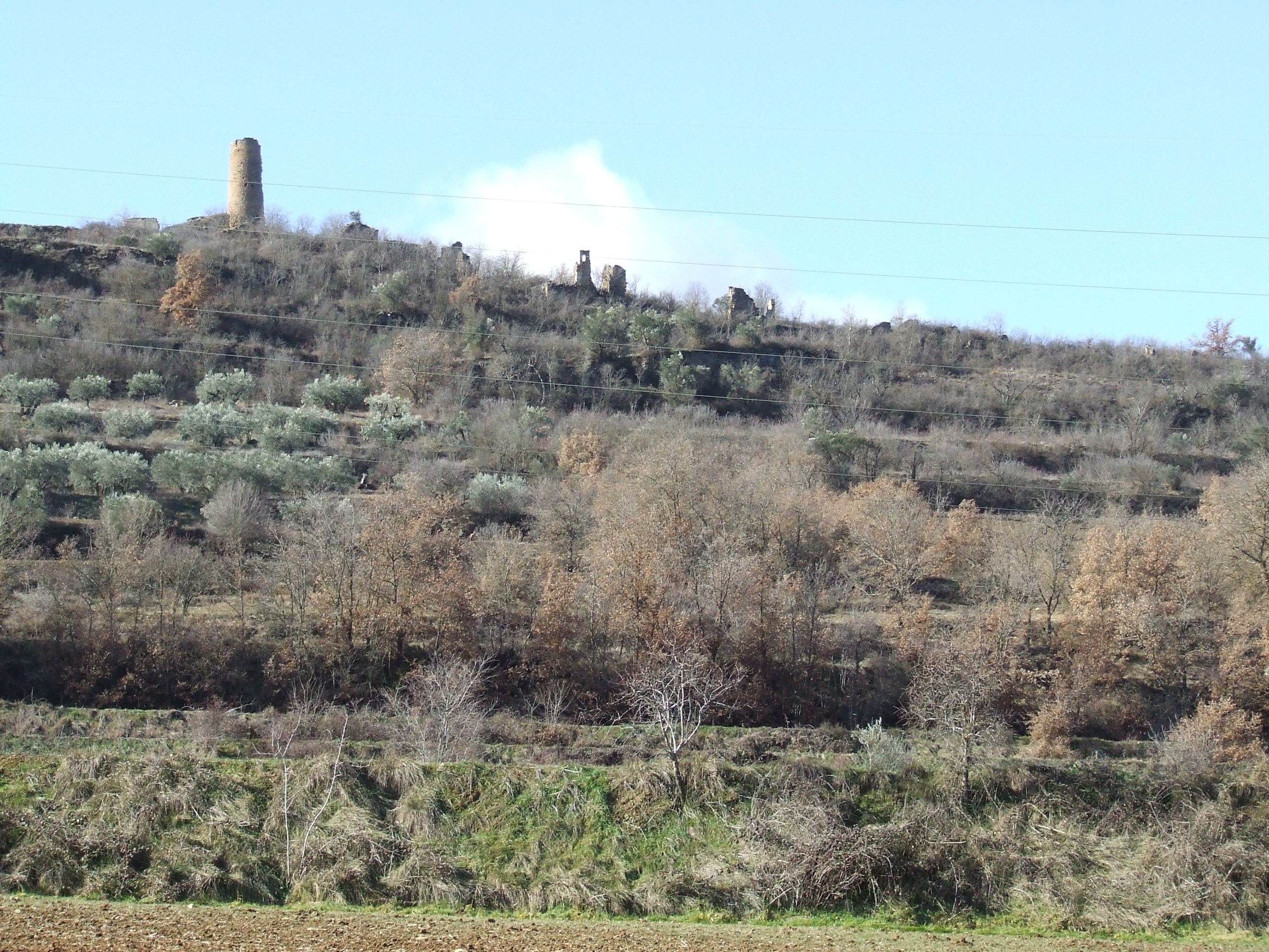 Vista del poble vell de Puigcercós (Palau de Noguera, Tremp, Pallars Jussà)